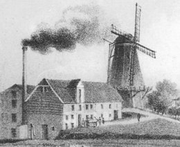 Langes Mühle --- Mill of Lange in Uetersen (Germany)